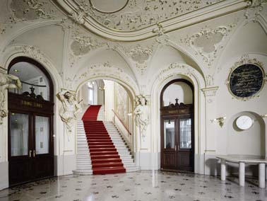 Eingangsfoyer des Opernhauses Zürich